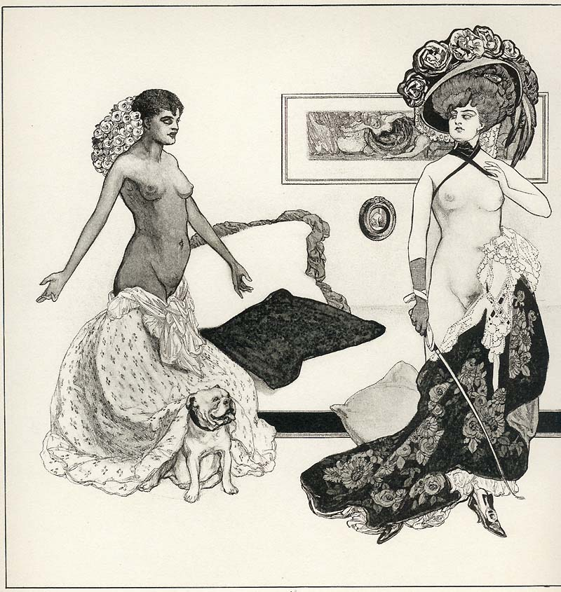 Der Toilettentisch - Der Rivale, 1908